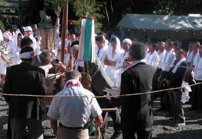 静岡県牧之原市細江で催される神明神社の御船神事